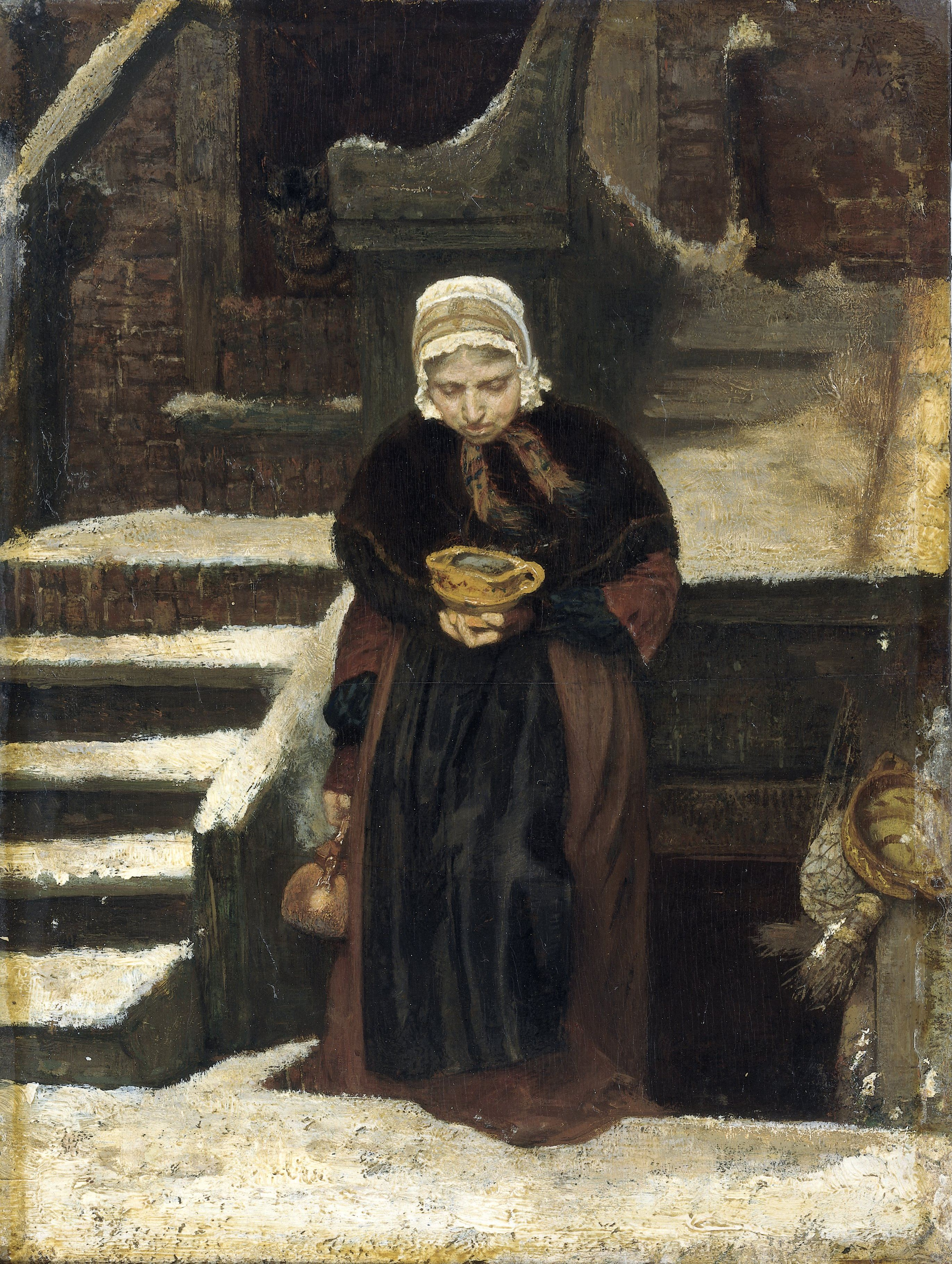 Voorstelling getiteld 'Nadagen'. Een oude vrouw treedt uit een kelderwoning naar buiten. Zij warmt haar handen aan een brandende vuurtest.